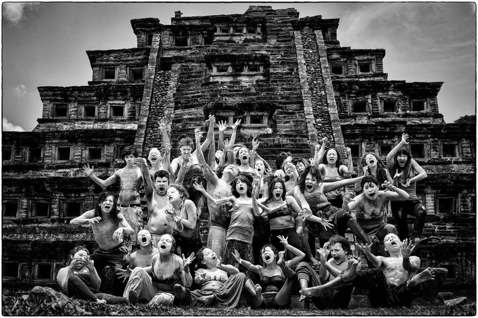 Retiro de Danza Butoh en Tajín, México